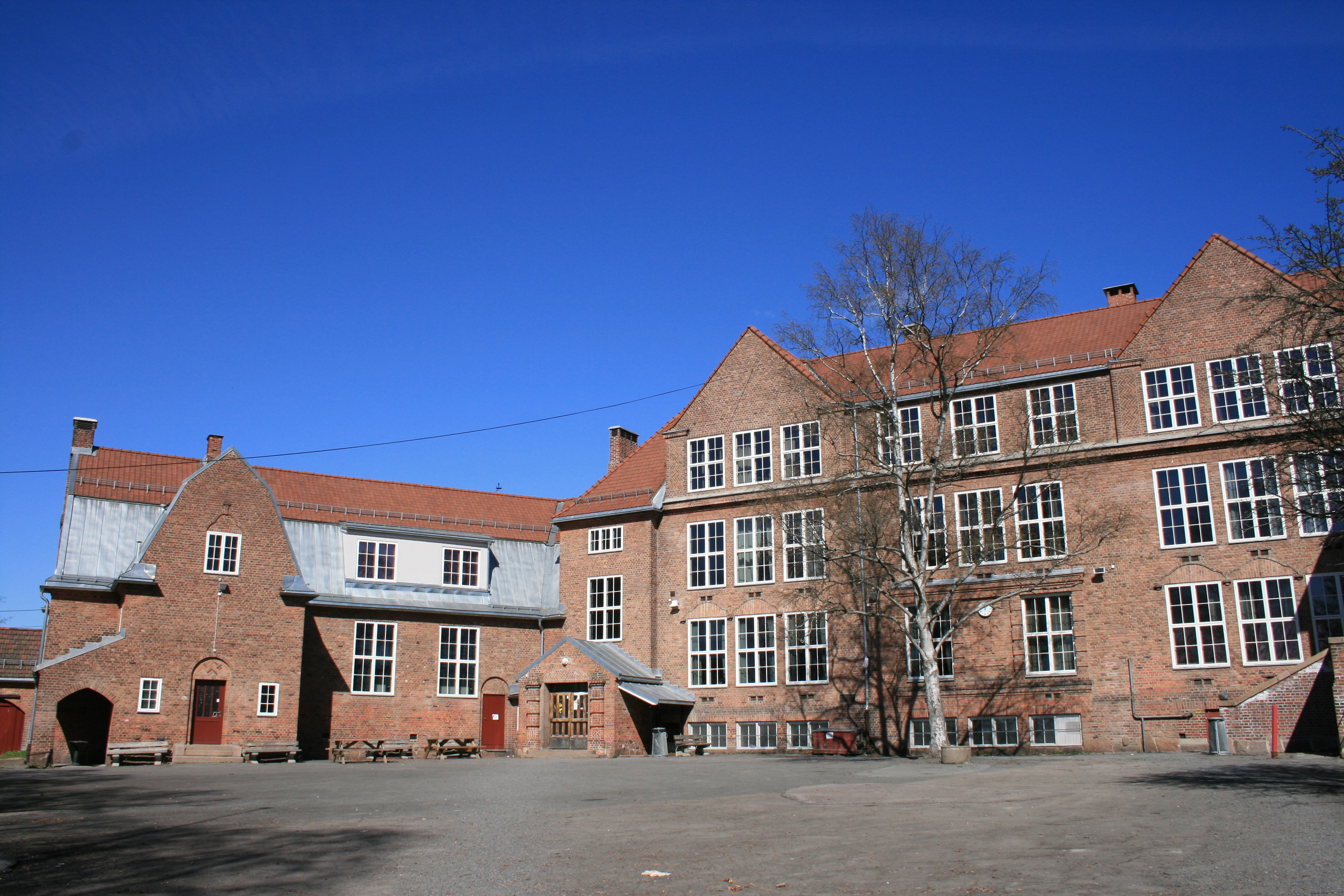 Grefsen videregående skole på Grefsen i Bydel Nordre Aker i Oslo. Arkitekt Kristian Biong. Fra 2013 Morellbakken skole.